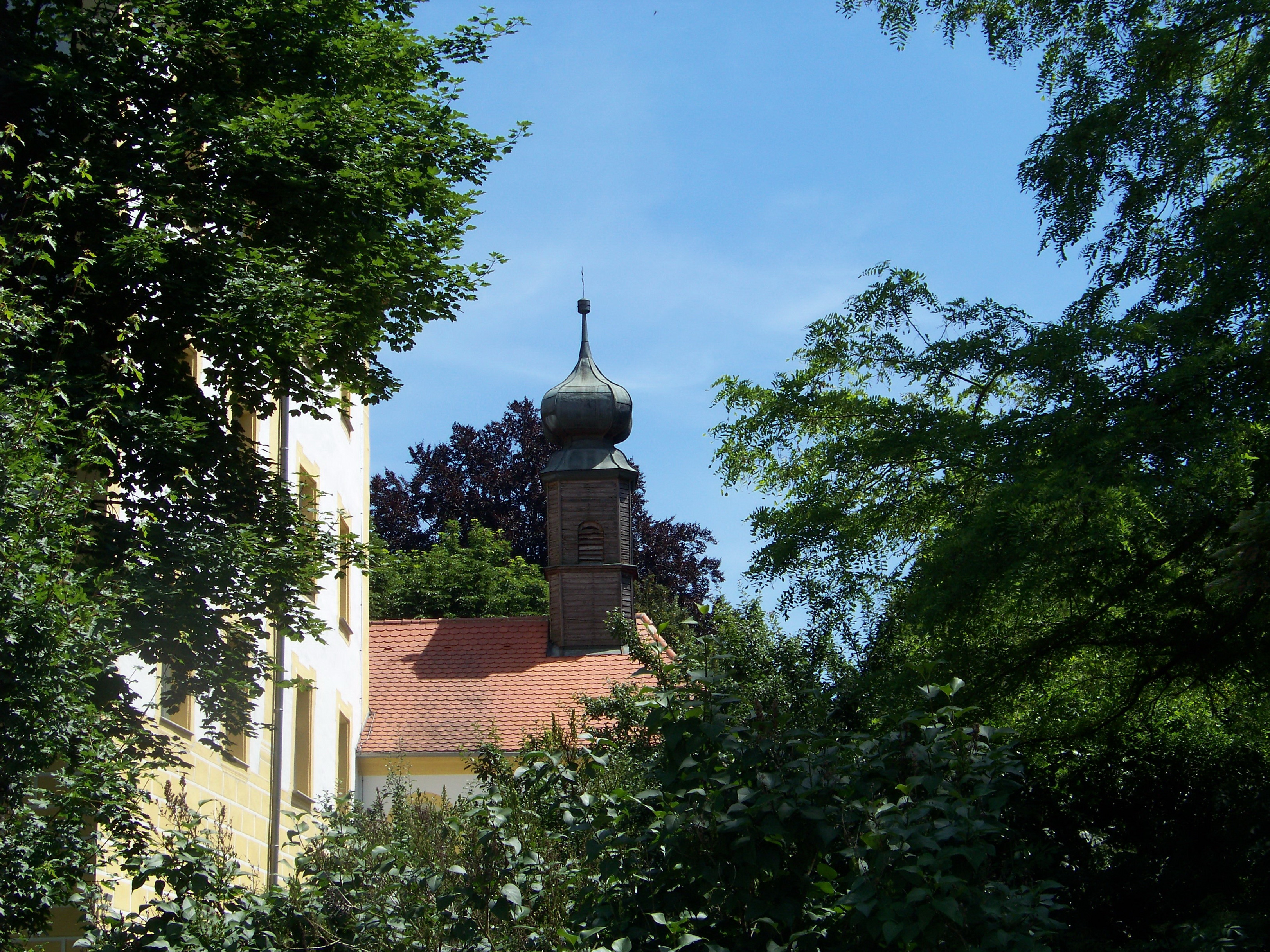 Mariaposching, Loham, Schloßstraße 2. Schloss, ehemalige Wasserschloßanlage des 16. Jhs., 1723 durchgreifend erneuert, Hauptbau quadratisch mit Zeltdach, an der Südostecke angebaut die Schlosskapelle St. Valentin, um 1714; mit Ausstattung.